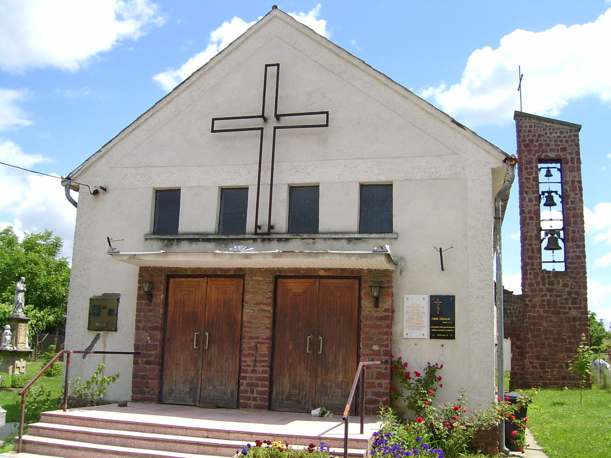 Katolika kapelo de Mezőcsokonya.